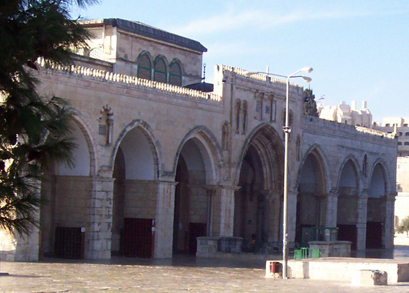 front_of_Al-Aqsa mosque